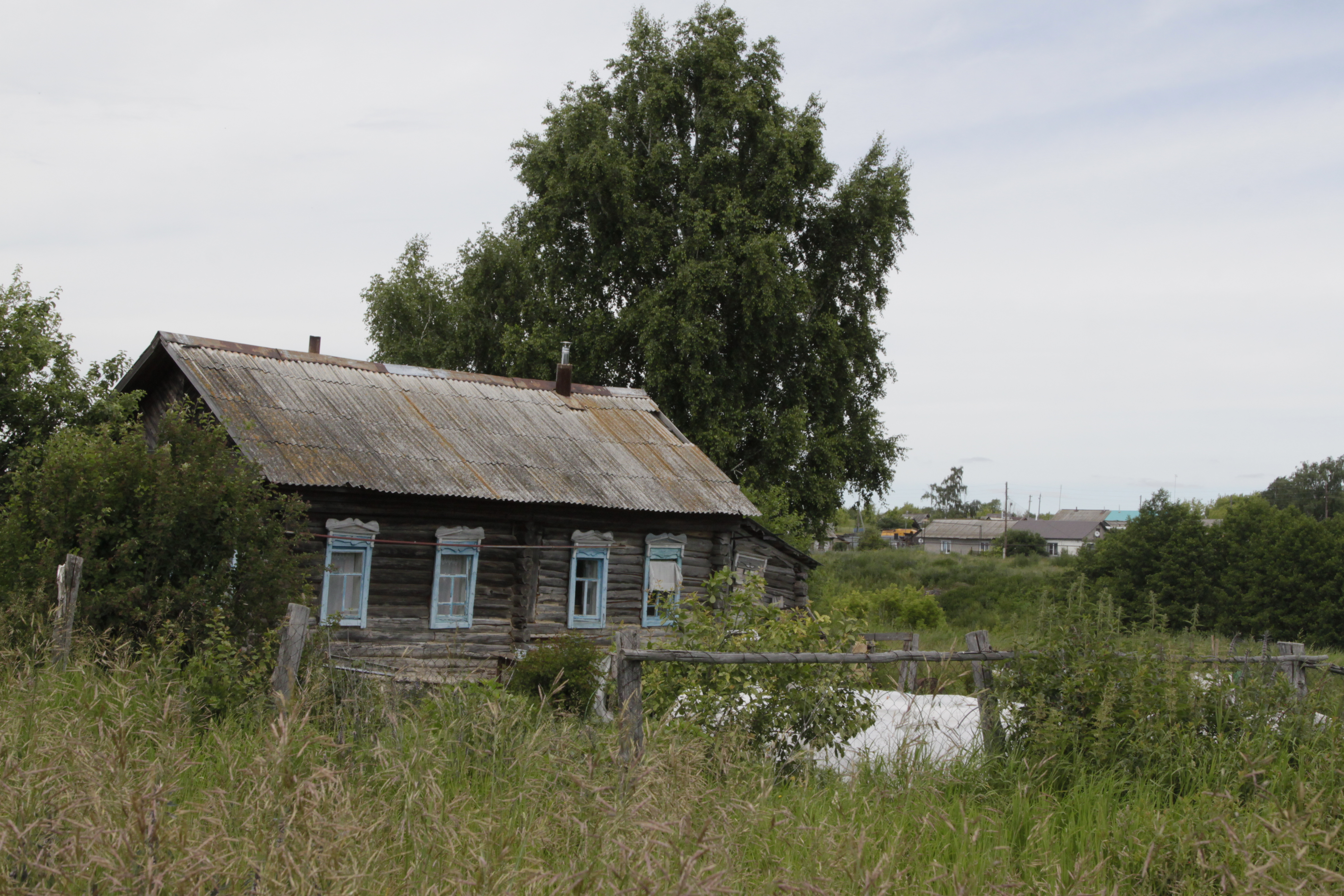 Село Пролейка Елховского района Самарской области Российской Федерации